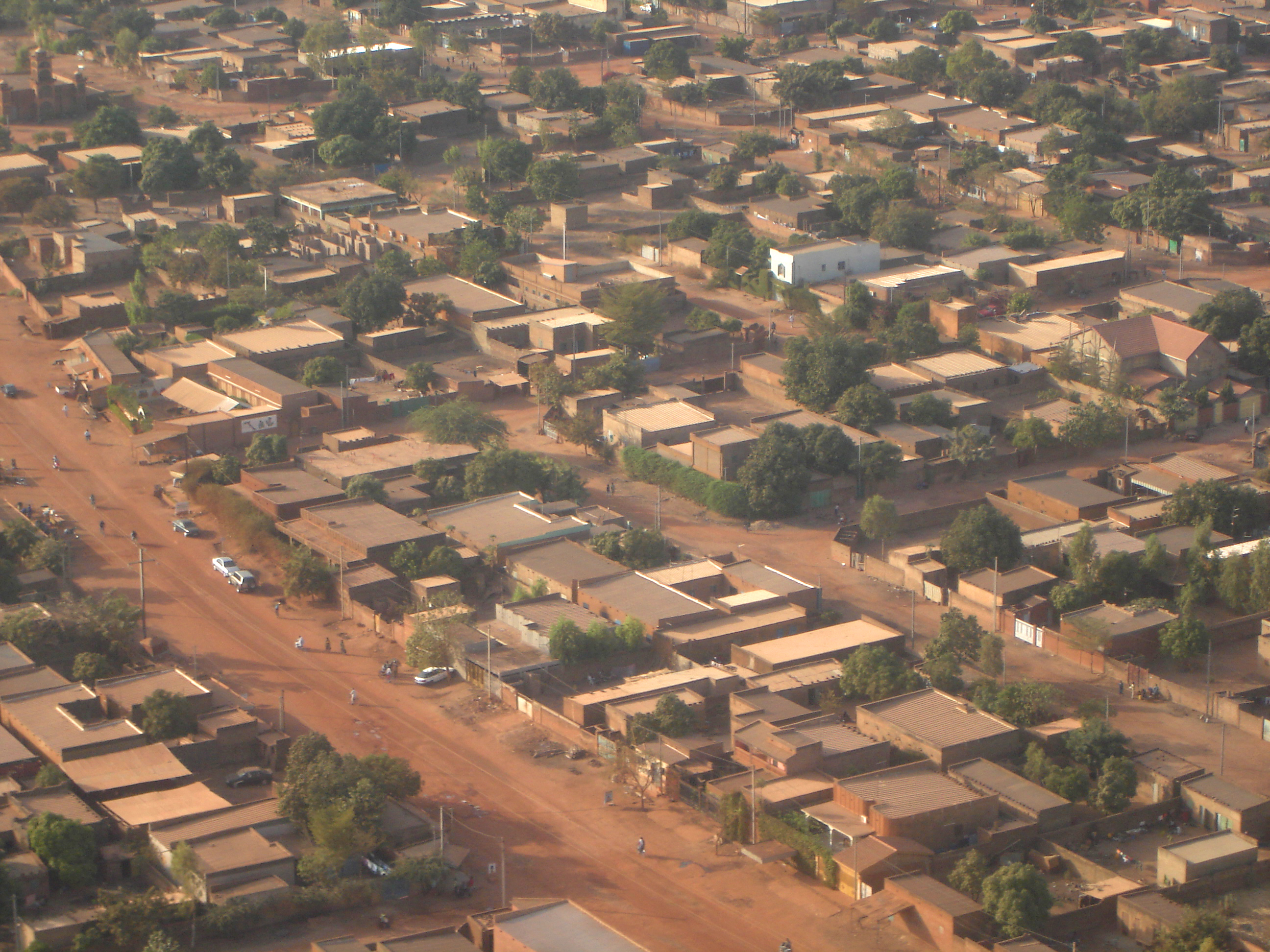 Burkina Faso: Luftbild von Ouagadougou (rue Warba im Secteur 16, Stadtteil Cissin)